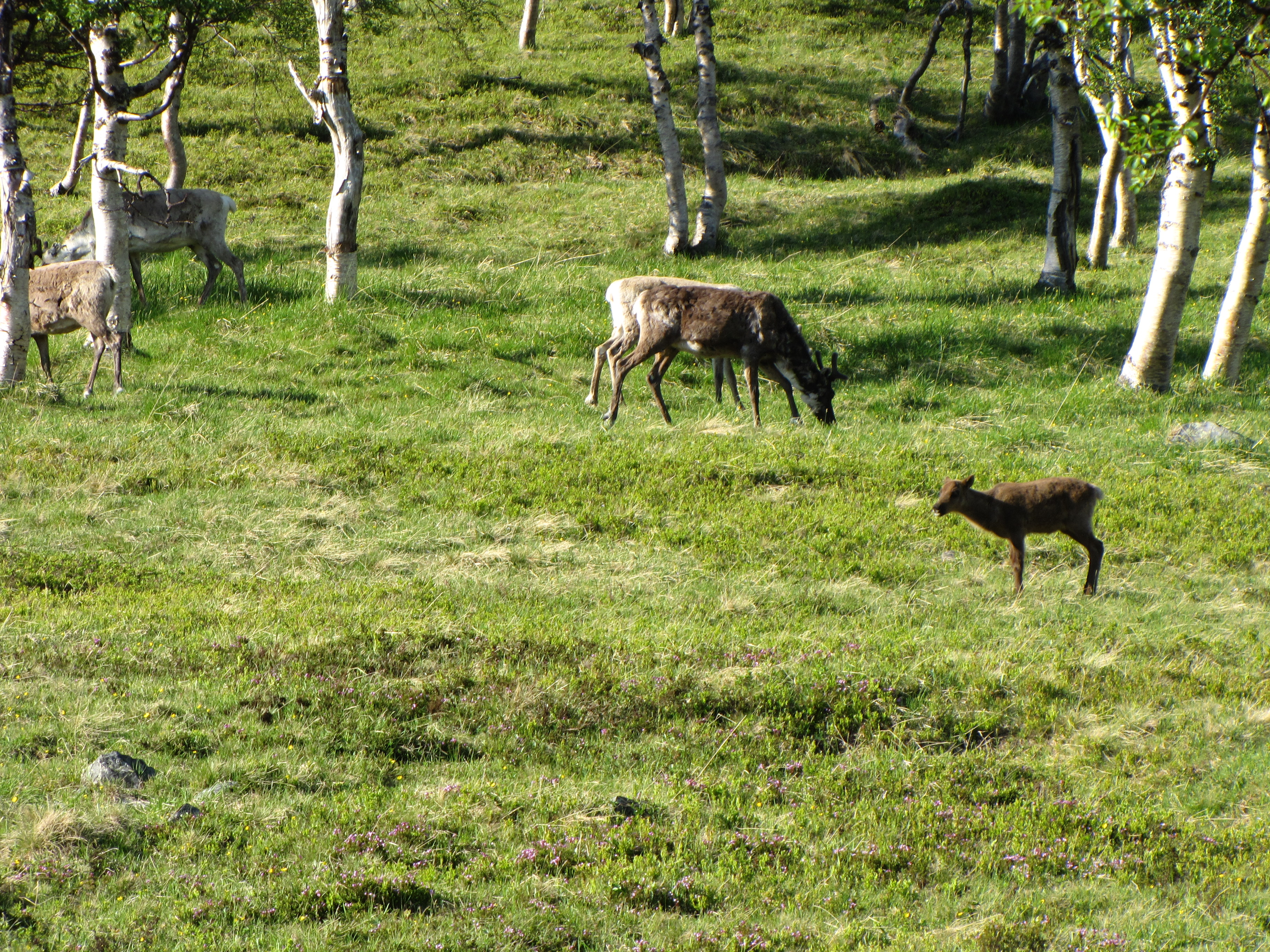 I Nordland fylke förekommer en omfattande renskötsel.